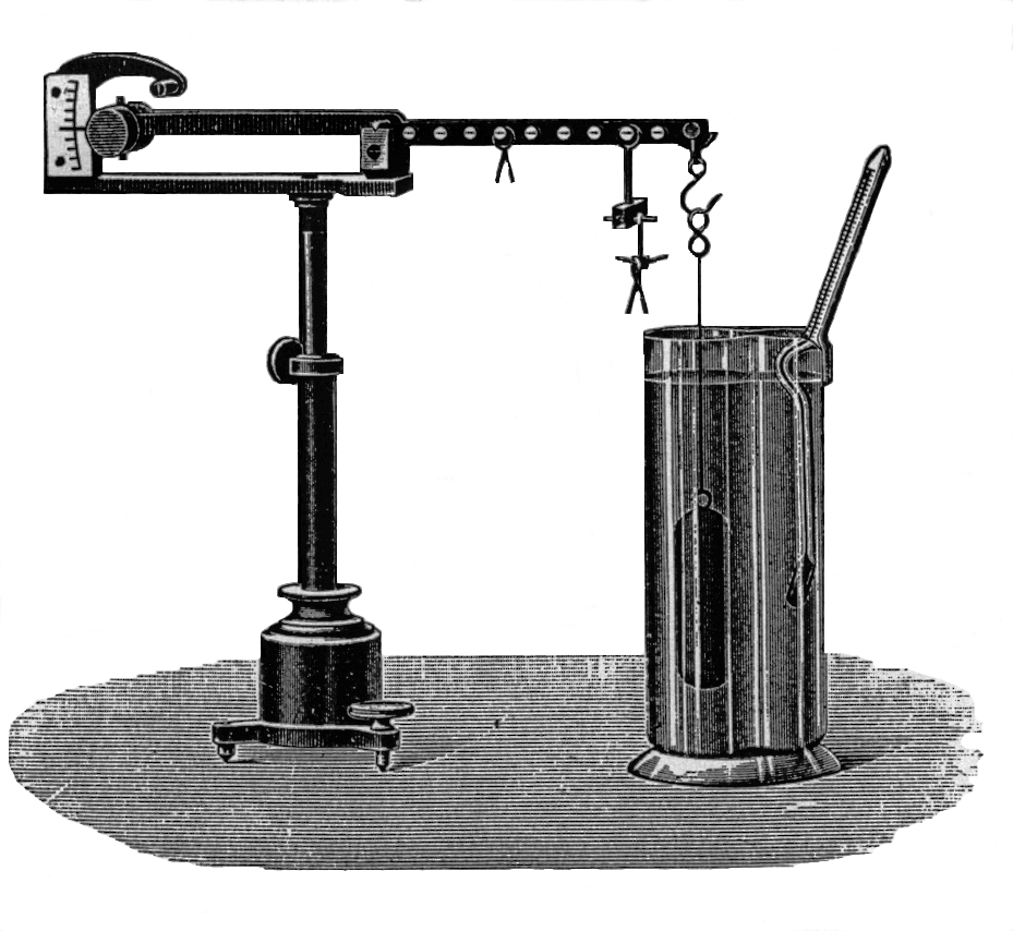 Balanza de Mohr-Westphal. Antigua ilustración.